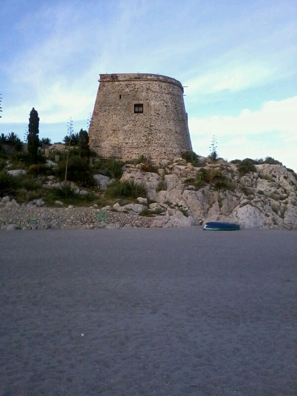 Torreón de Taramay, (Torre vigía en Playa Tesorillo, Almuñecar, Granada, España).